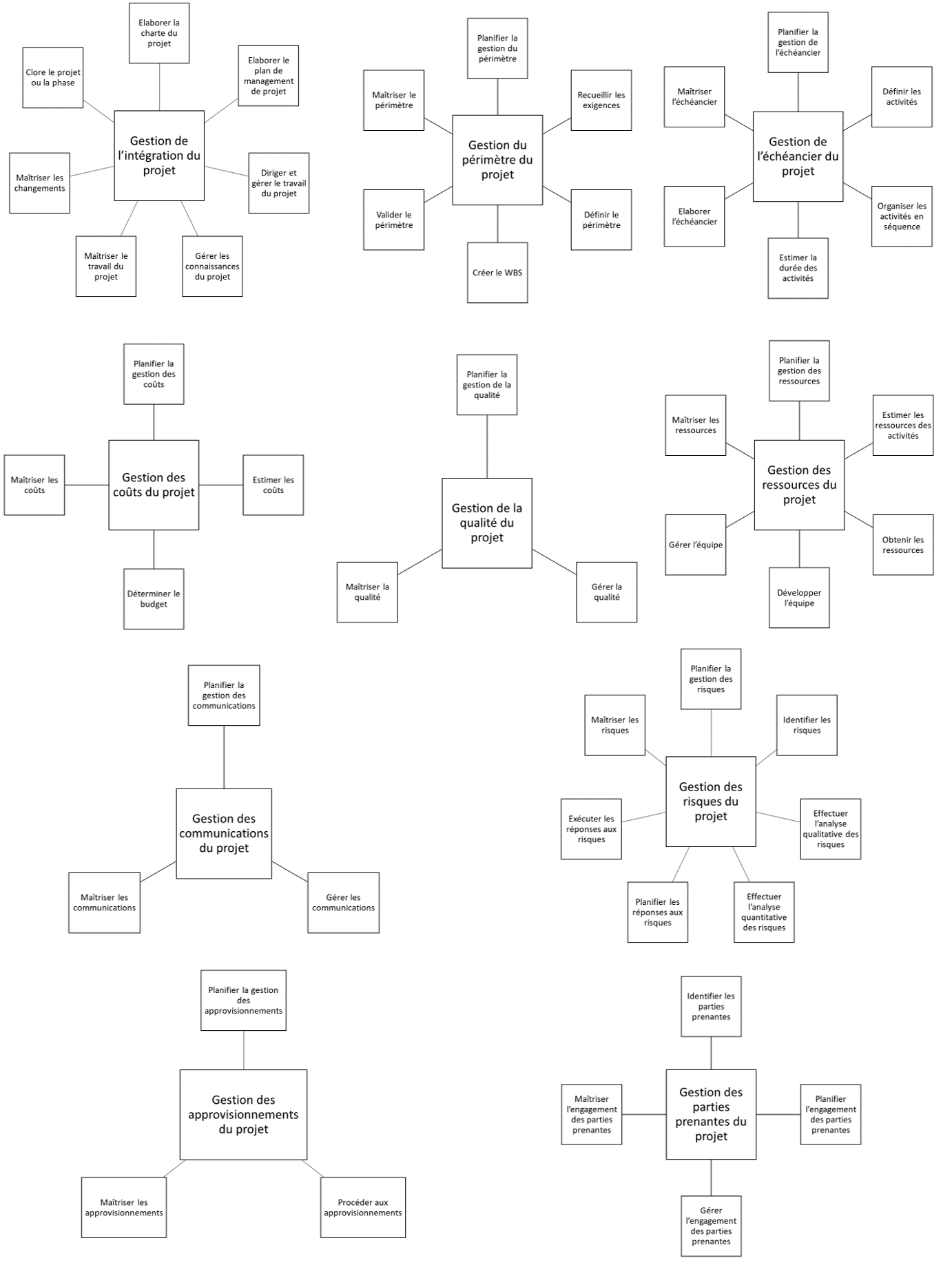 Ces schémas rattachent les 49 processus aux 10 domaines de connaissances du PMBOK